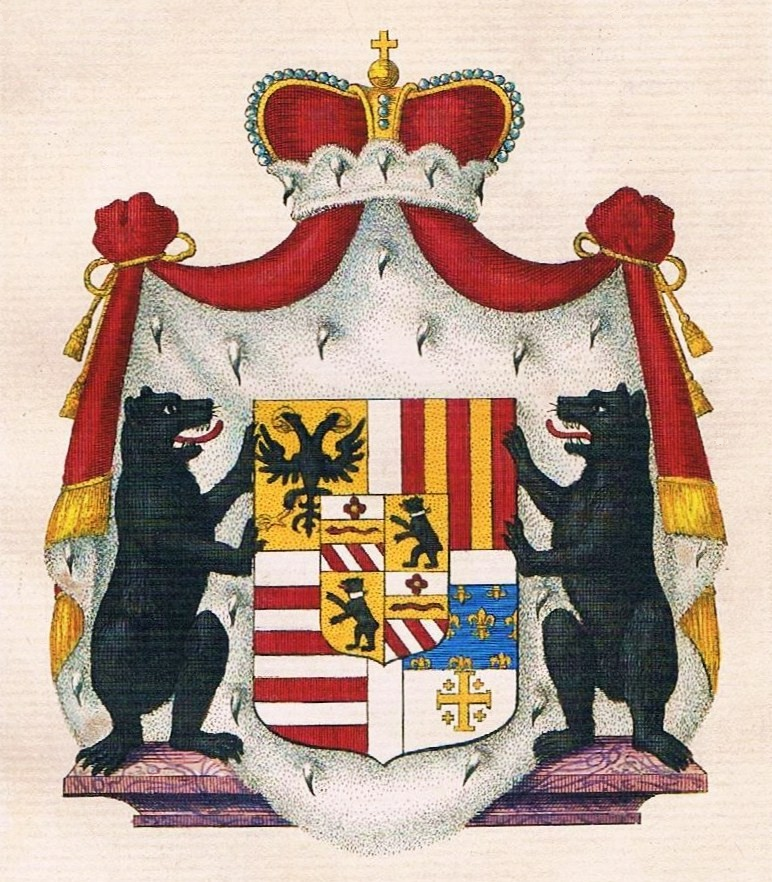 Wappen der Fürsten Orsini di Gravina (Ursini de Gravina)